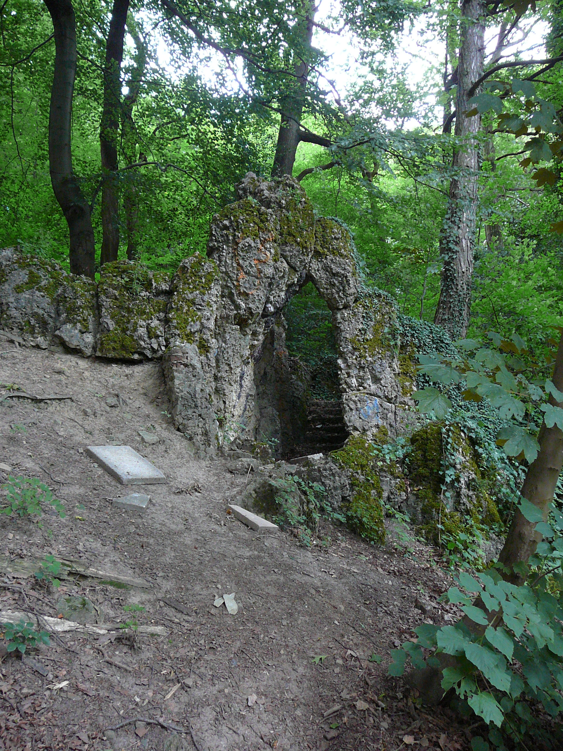 Jagdhausweg, Wuppertal